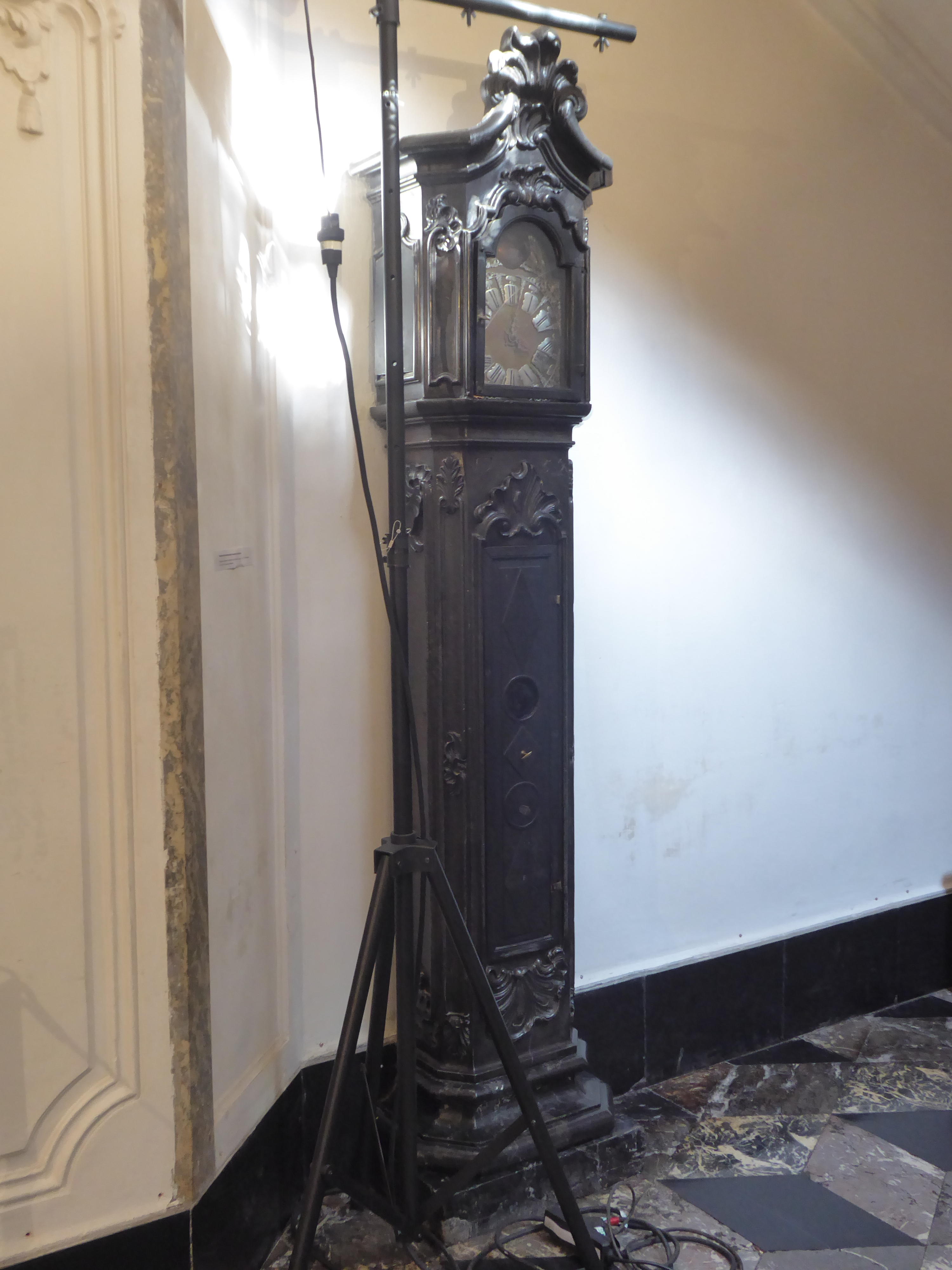 Horloge de parquet du Musée de Groesbeeck-de Croix. Le mécanisme mentionne la date 1759 et l'horloger Jean-Dieudonné Vierset. Classé comme bien classé de la communauté française depuis le 10 avril 2014.